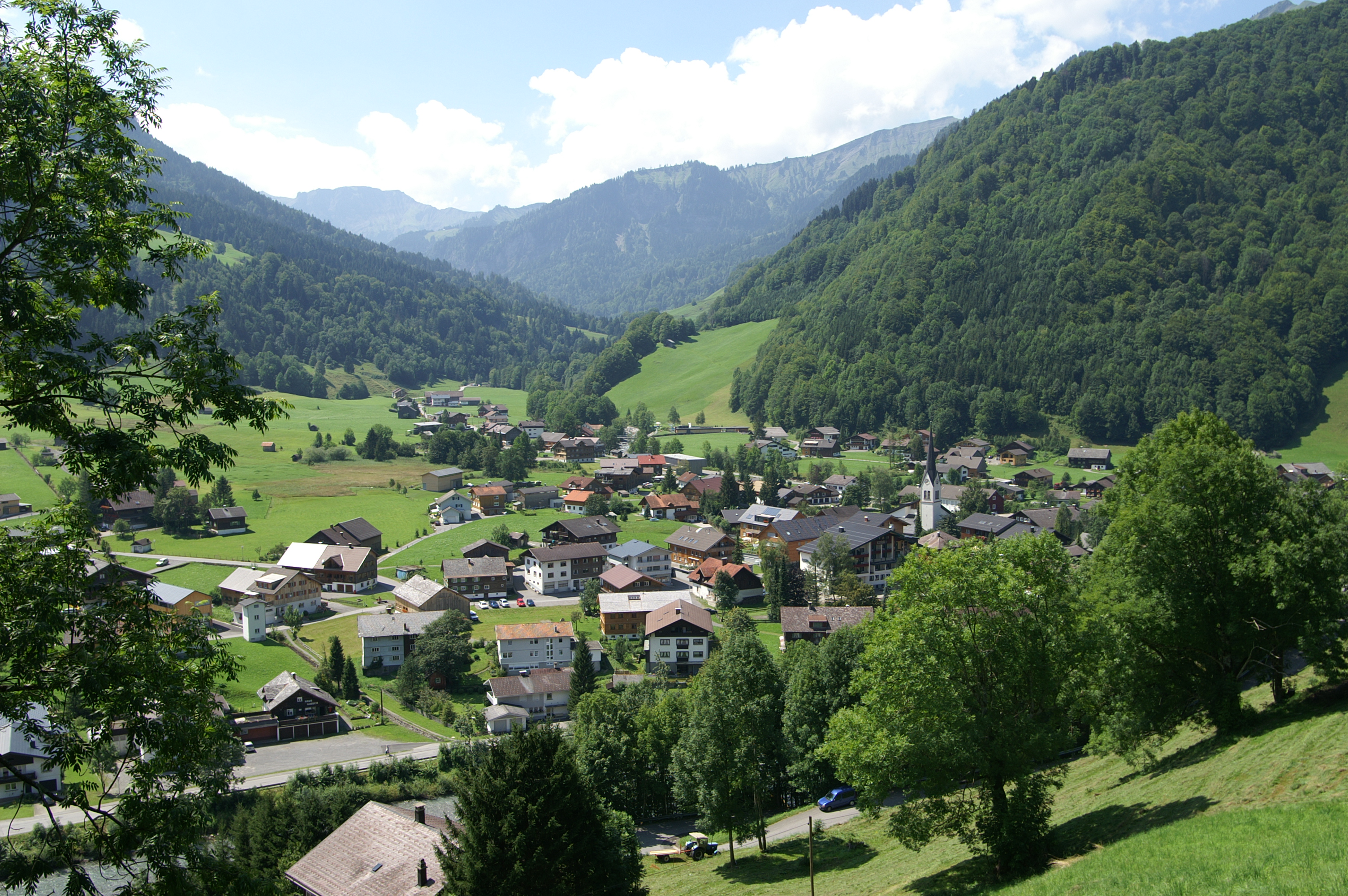 Gemeinde Mellau im Bregenzerwald